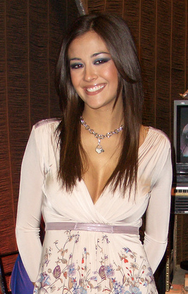 Italian Show Girl Giorgia Palmas